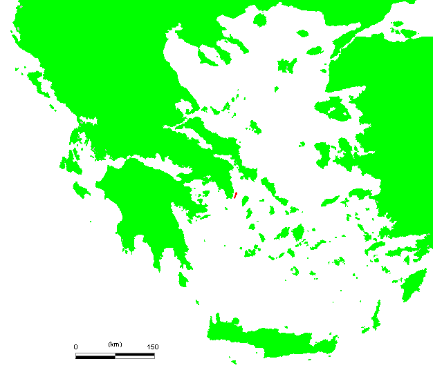 GR Makronissos.PNG (Greek island)